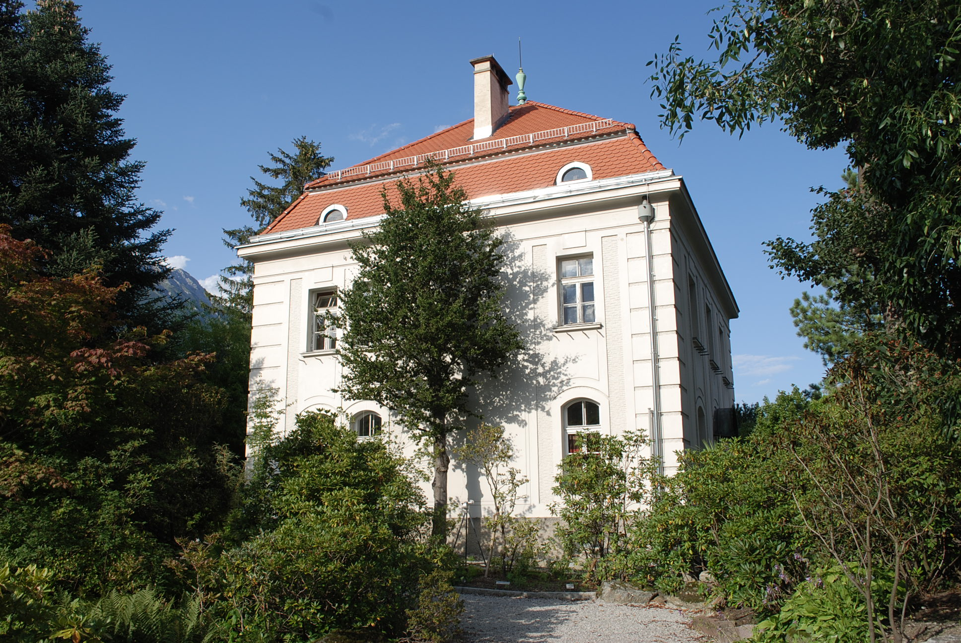 Verwalterhaus des Botanischen Instituts, Innsbruck